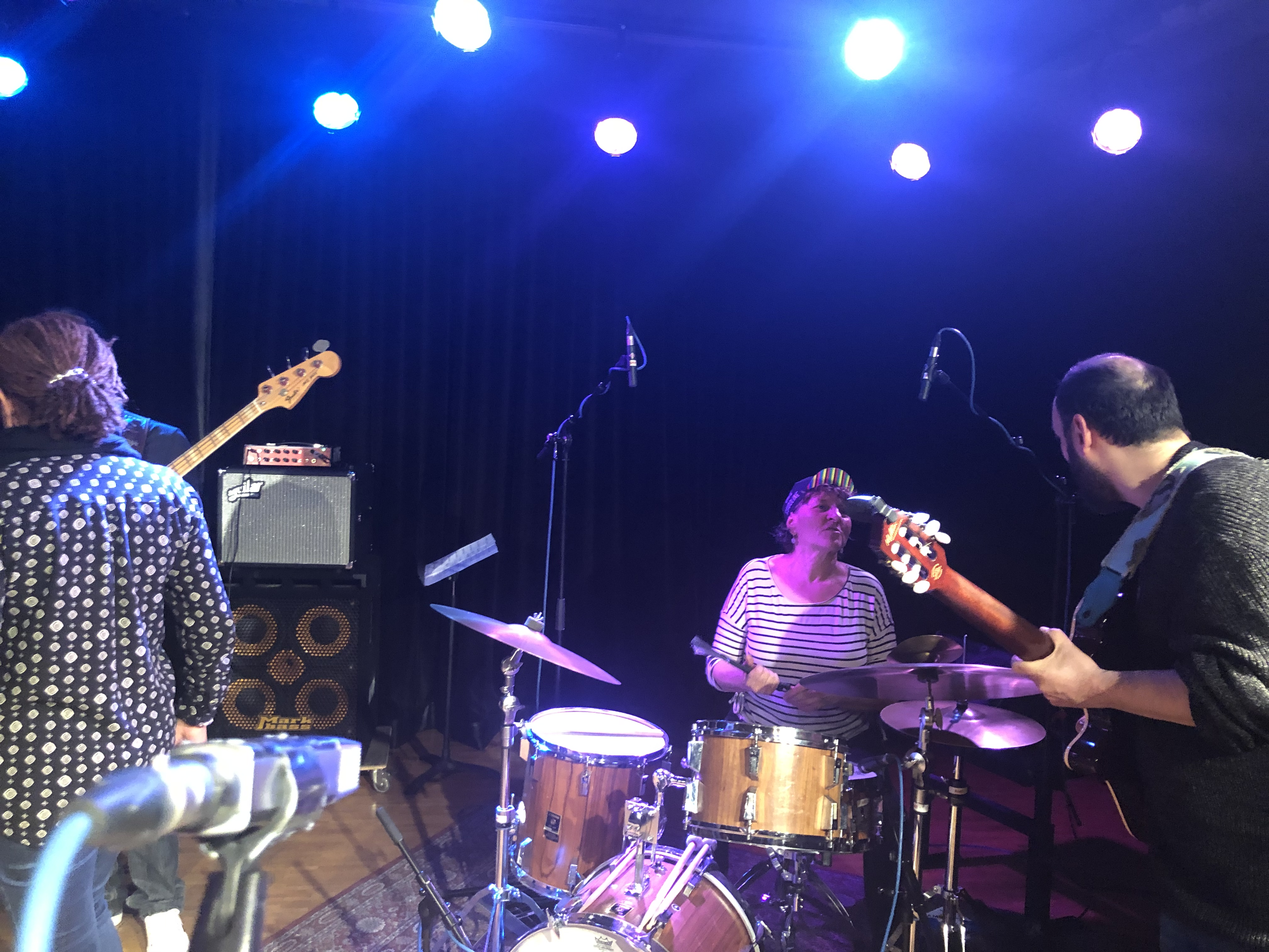 Concert jam session AMR mai 2019